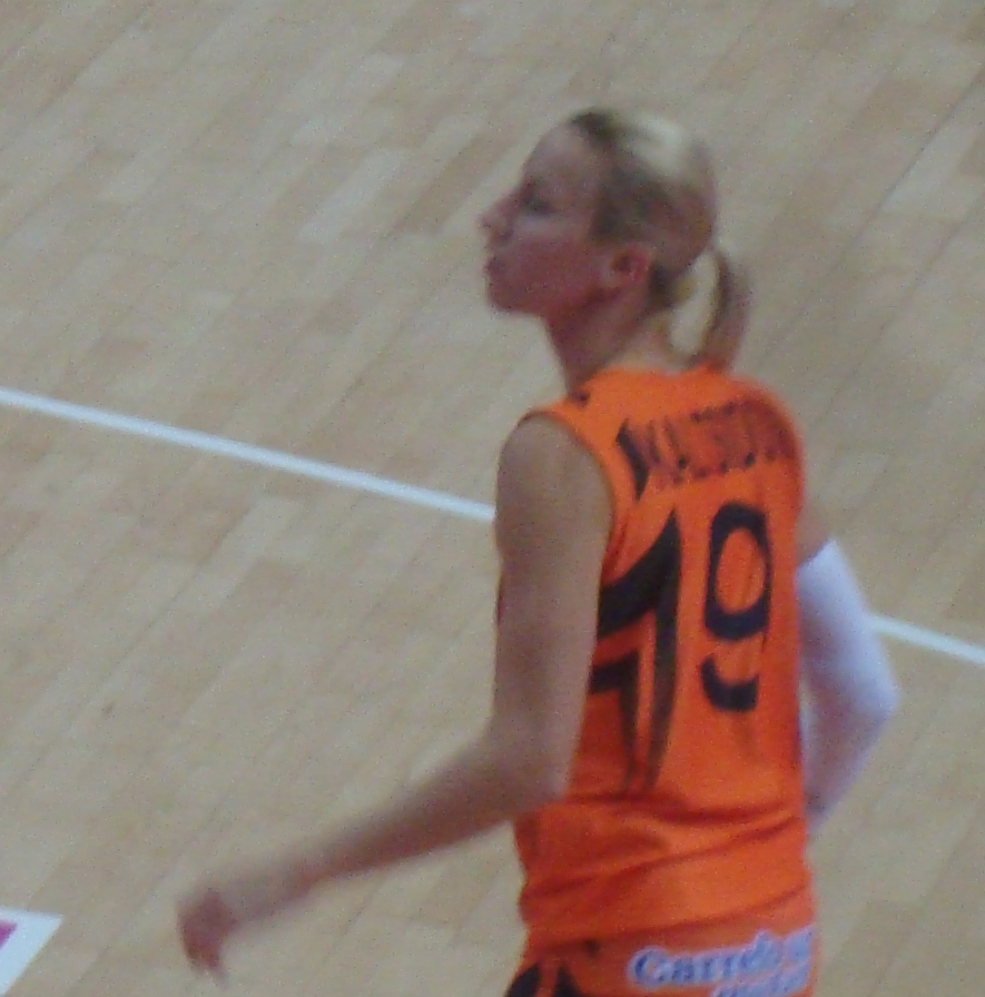 la basketteuse grecque Stella Kaltsidou sous le maillot de Bourges